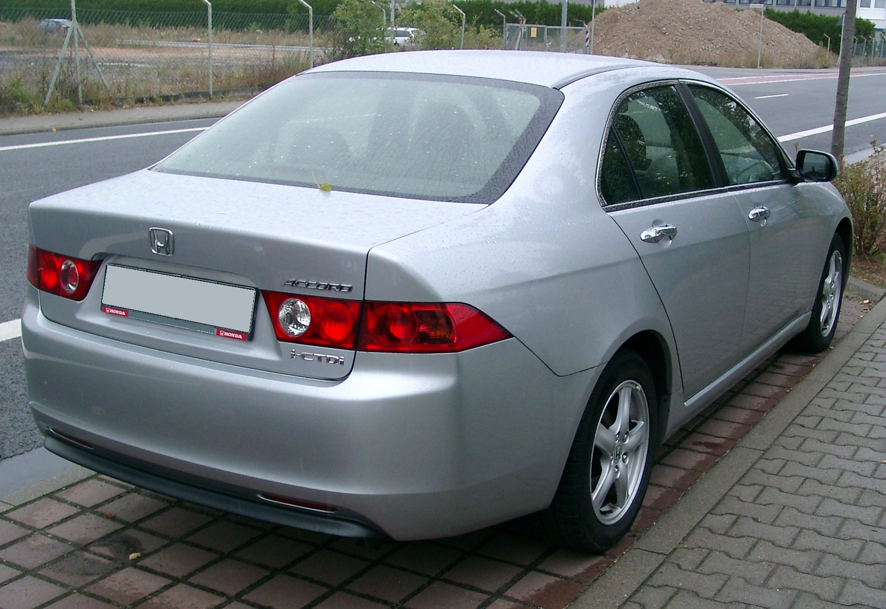 Honda Accord